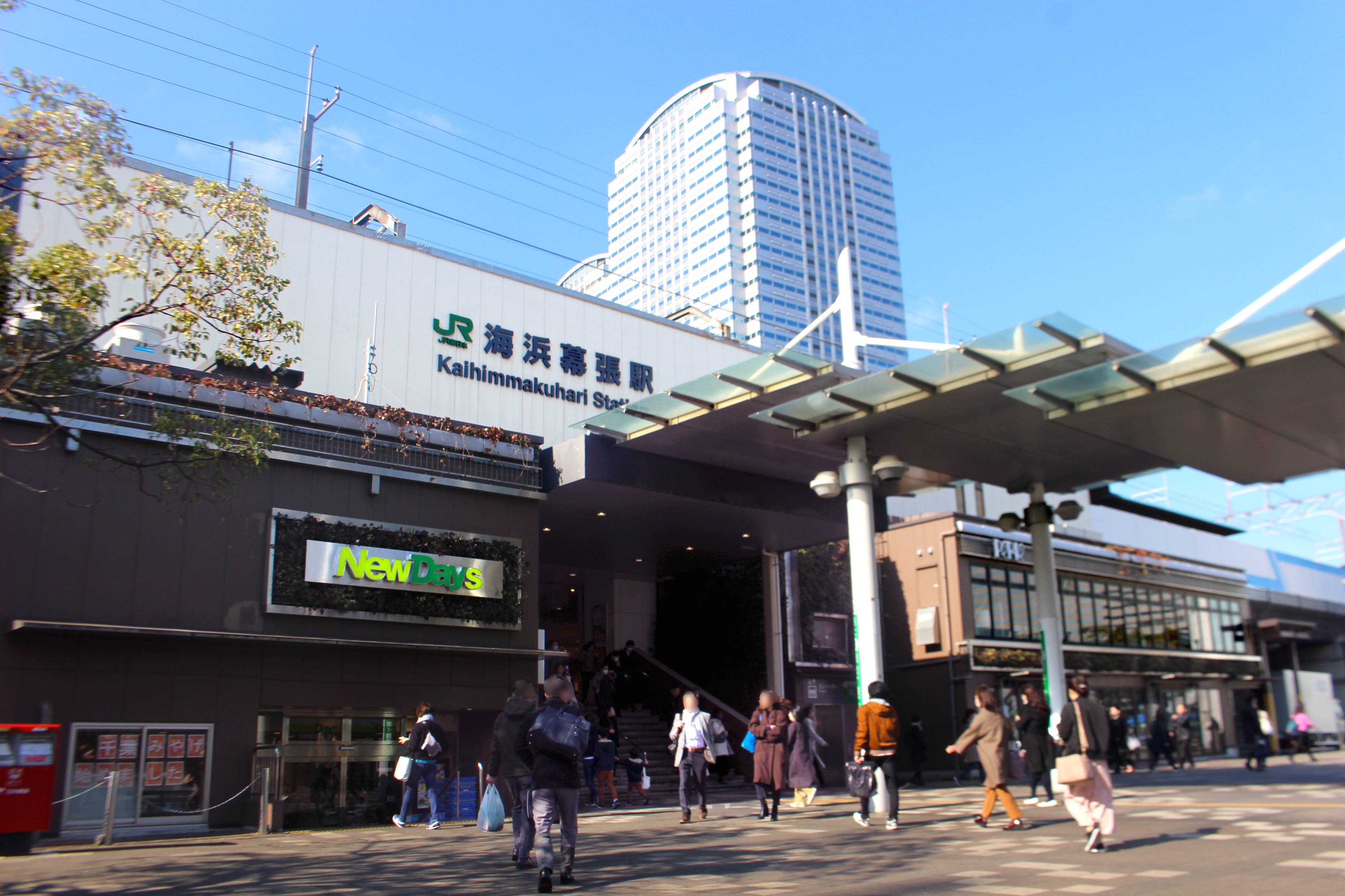 Kaihin-Makuhari Station North 20190305